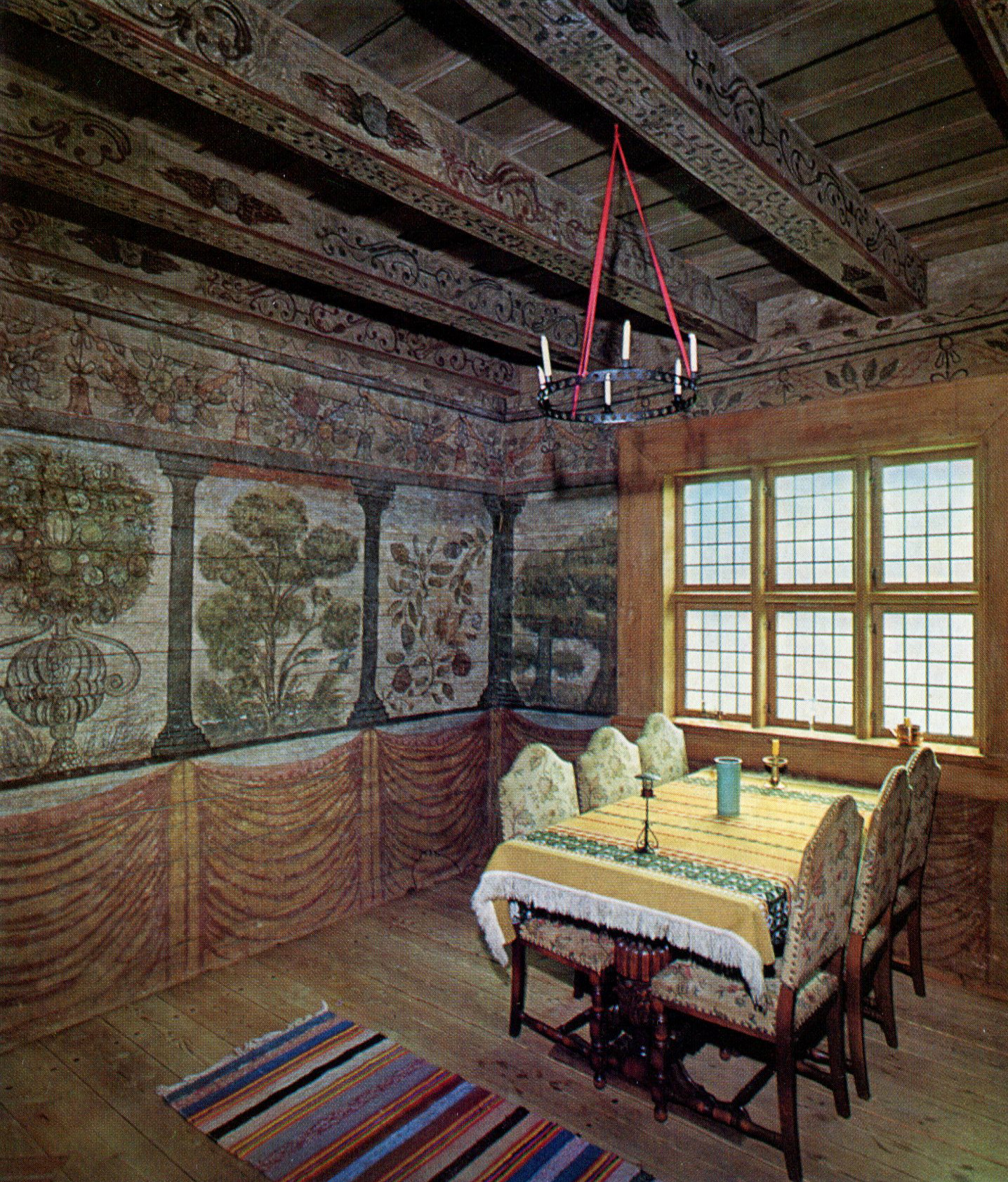 Vasarummet på Erikssunds gård